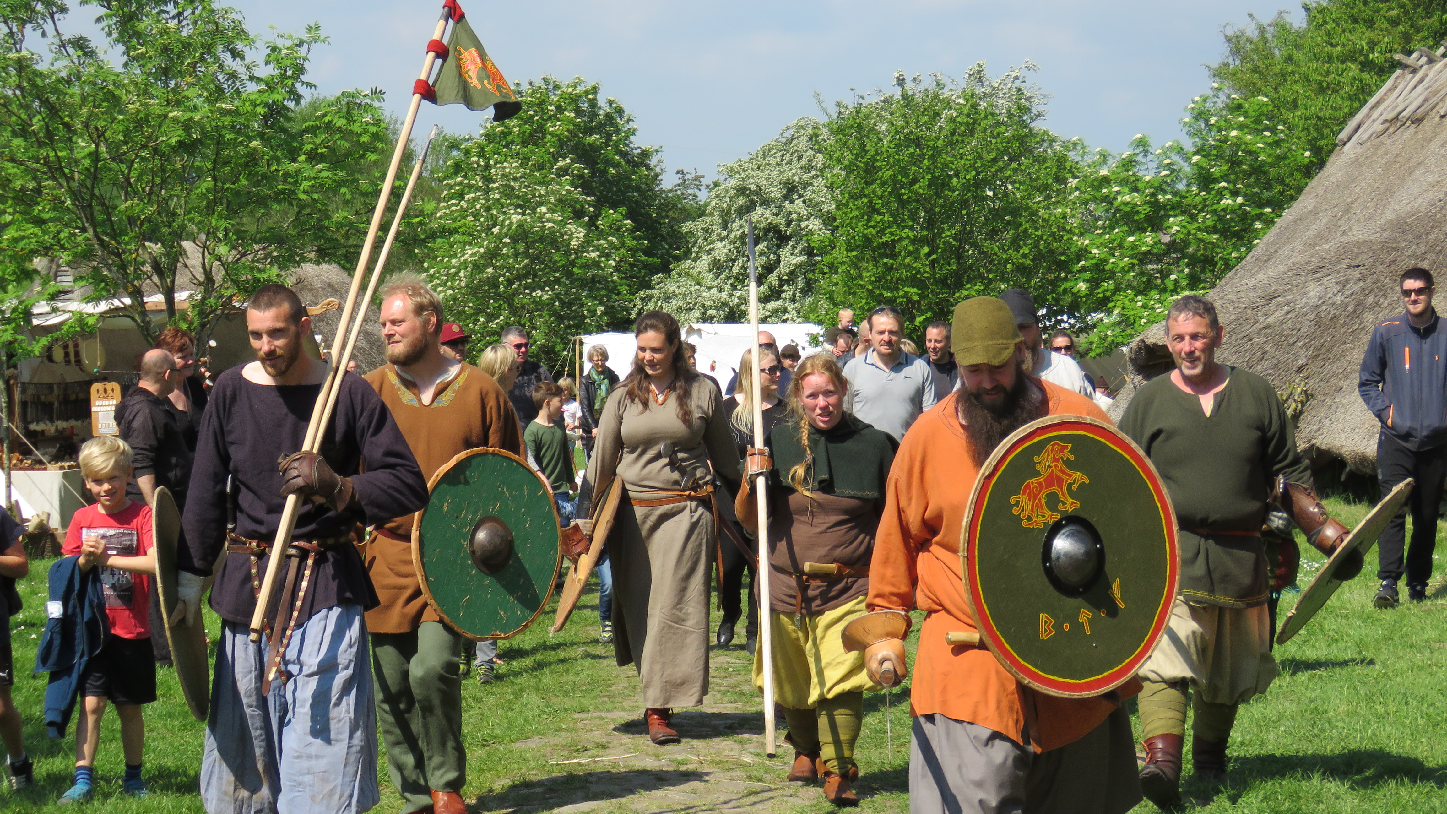 Vikings come from all over Denmark, to participate at the Iron Age Market in the village